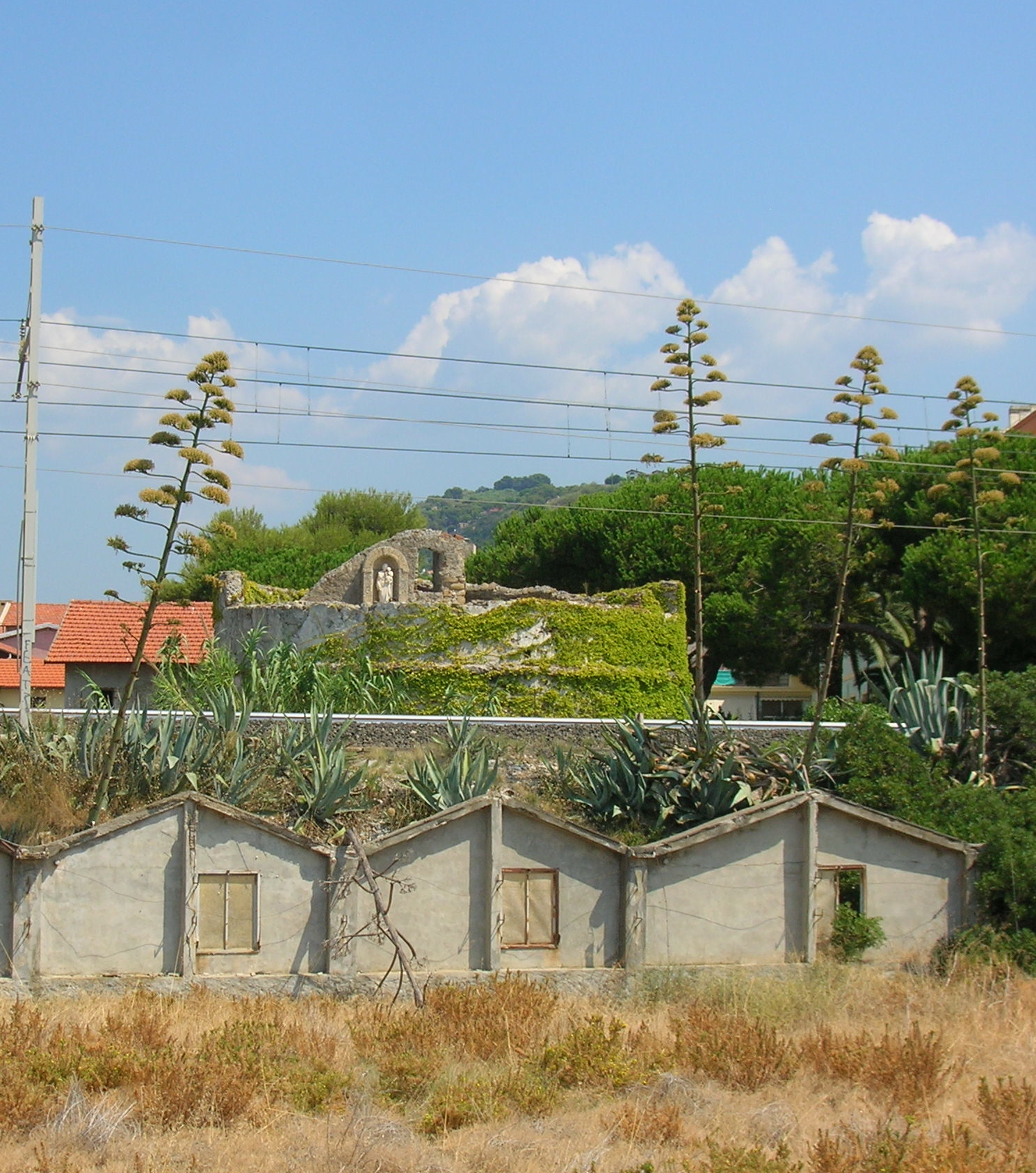 il Torrione. Vallecrosia, Liguria, Italia.